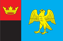 Прапор Сокальського району